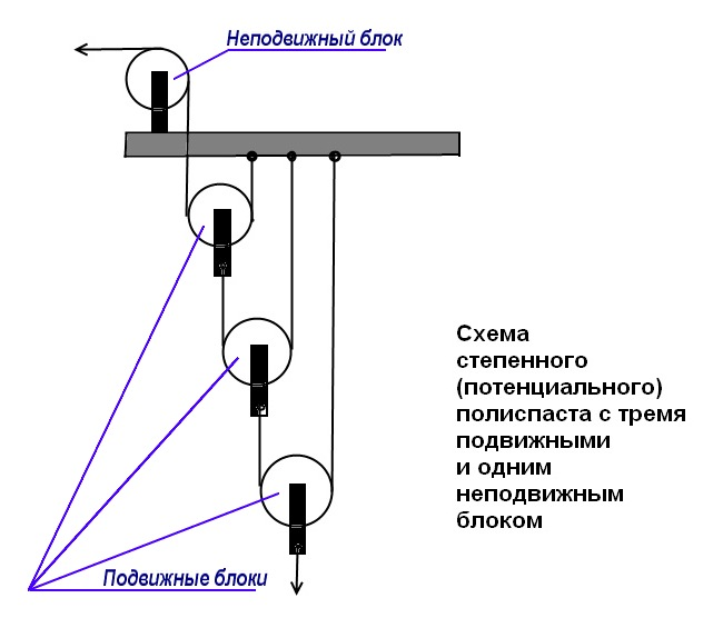 Схема степенного (потенциального)полиспаста с тремя подвижными блоками